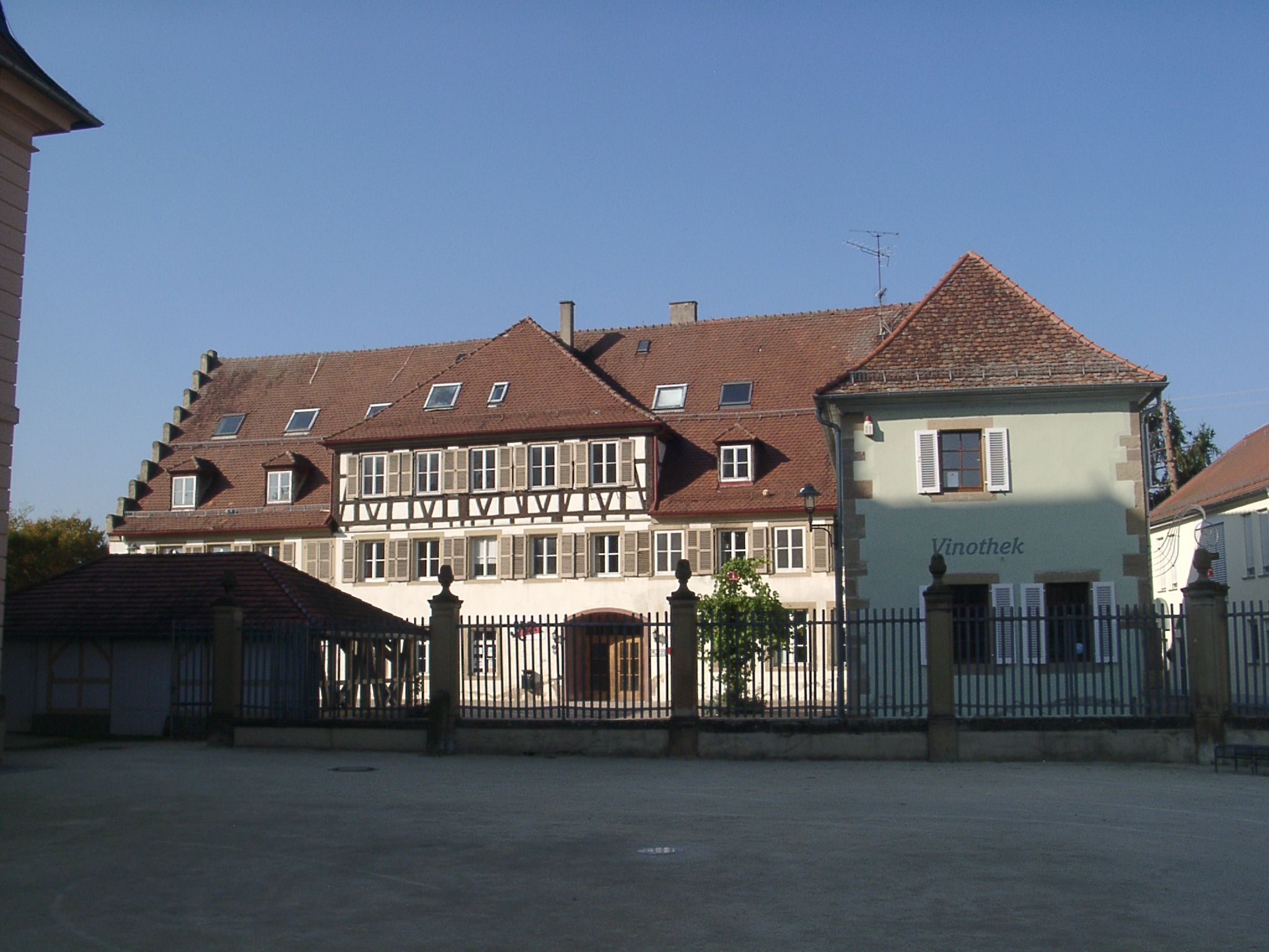 Bönnigheim